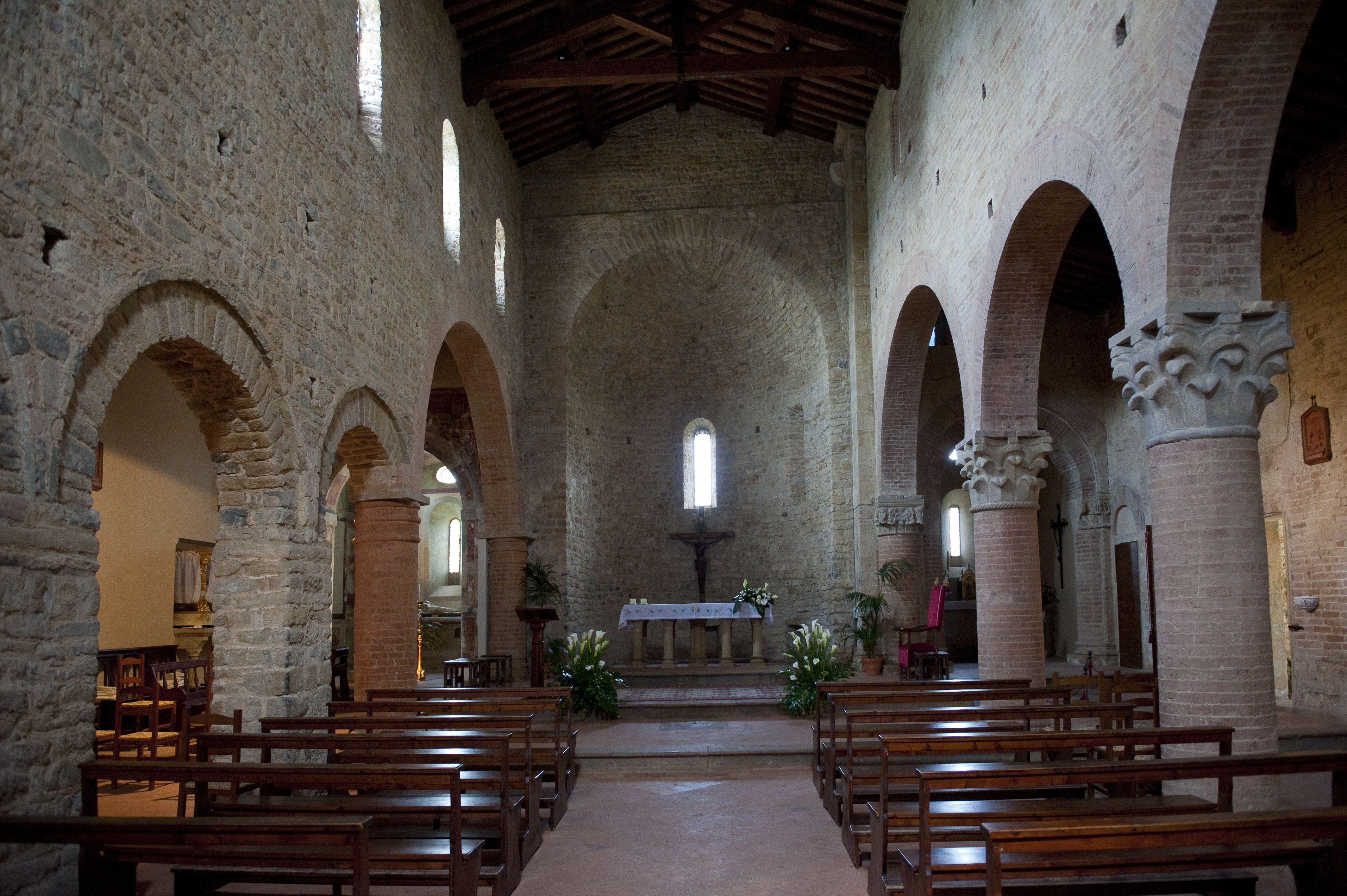 Interno della pieve di Sant'Appiano, Barberino Val d'Elsa